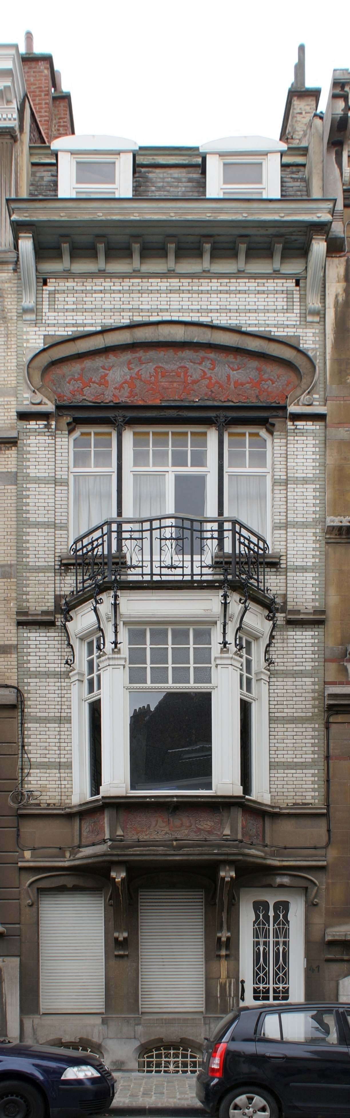 Elsene, Van Elewyckstraat 41 (1903). Art nouveau. Oeuvre van architect Aimable Delune. Persoonlijke woning van de architect.